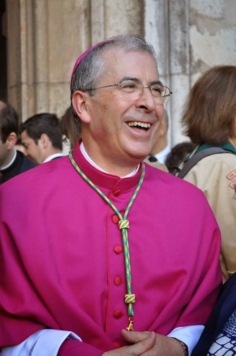 D. José Traquina, bispo titular de Lugura e auxiliar de Lisboa